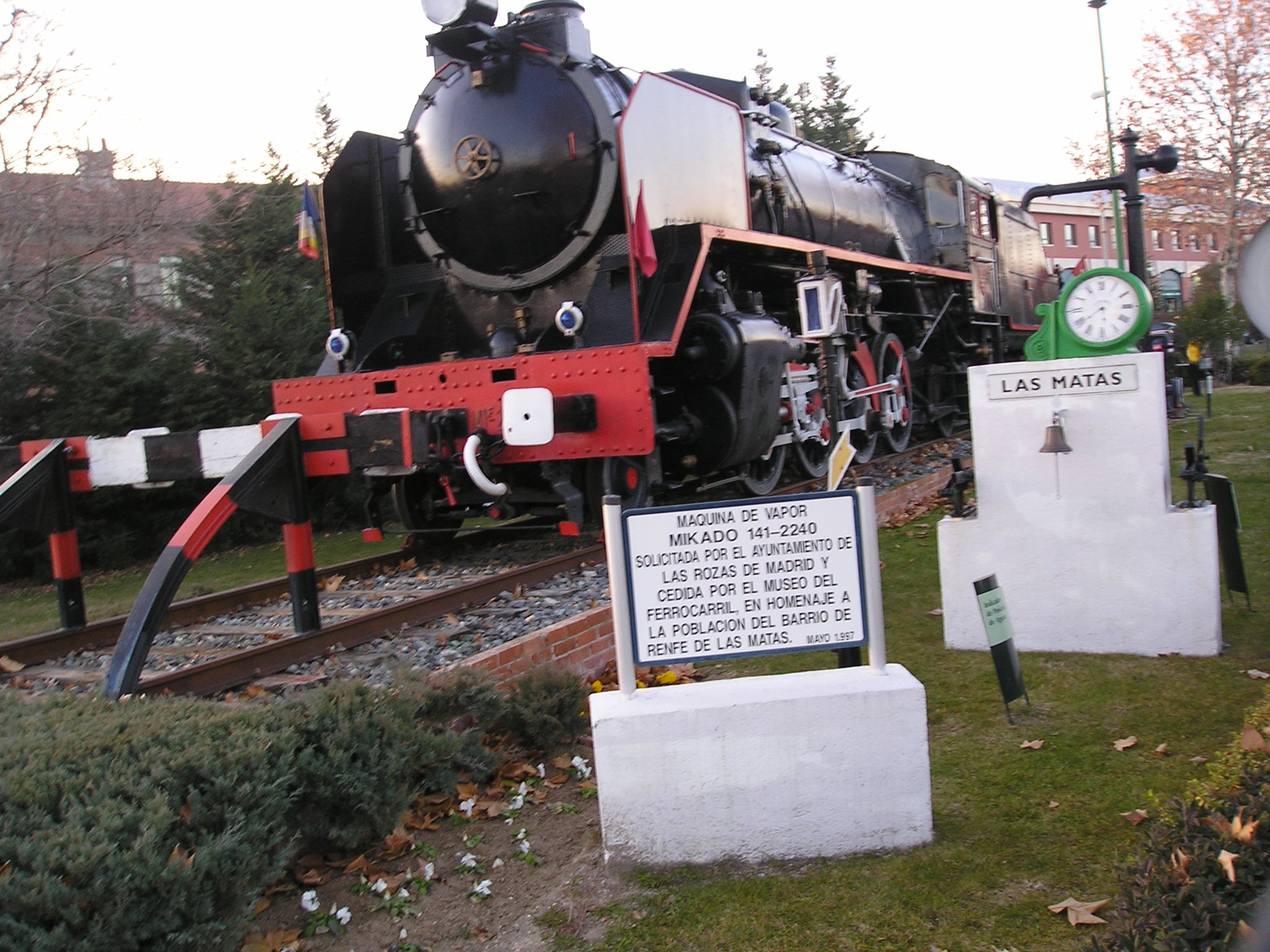 Maquina donada al Ayuntamiento de Las Rozas por el museo del ferrocarril de Madrid en homenaje al barrio de Renfe de Las Matas. Realizada el 6-1-2006 por Santiago Agueda Alonso.